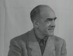 Oswald Ludwig Pohl (* 30. Juni 1892 in Duisburg; † 7. Juni 1951 in Landsberg) war ein deutscher SS-Obergruppenführer und General der Waffen-SS. Pohl war als Leiter des SS-Wirtschafts- und Verwaltungshauptamtes (WVHA) maßgeblich an der Durchführung des Holocausts beteiligt. Als Kriegsverbrecher wurde Pohl während der Nürnberger Prozesse zum Tode verurteilt und 1951 hingerichtet.